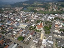 Fotografia aérea de Braço do Norte em 2 de setembro de 2012